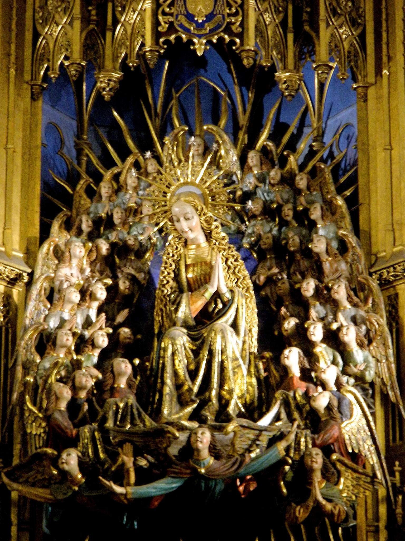 Iglesia de Santa María, Galdakao (Bizkaia)